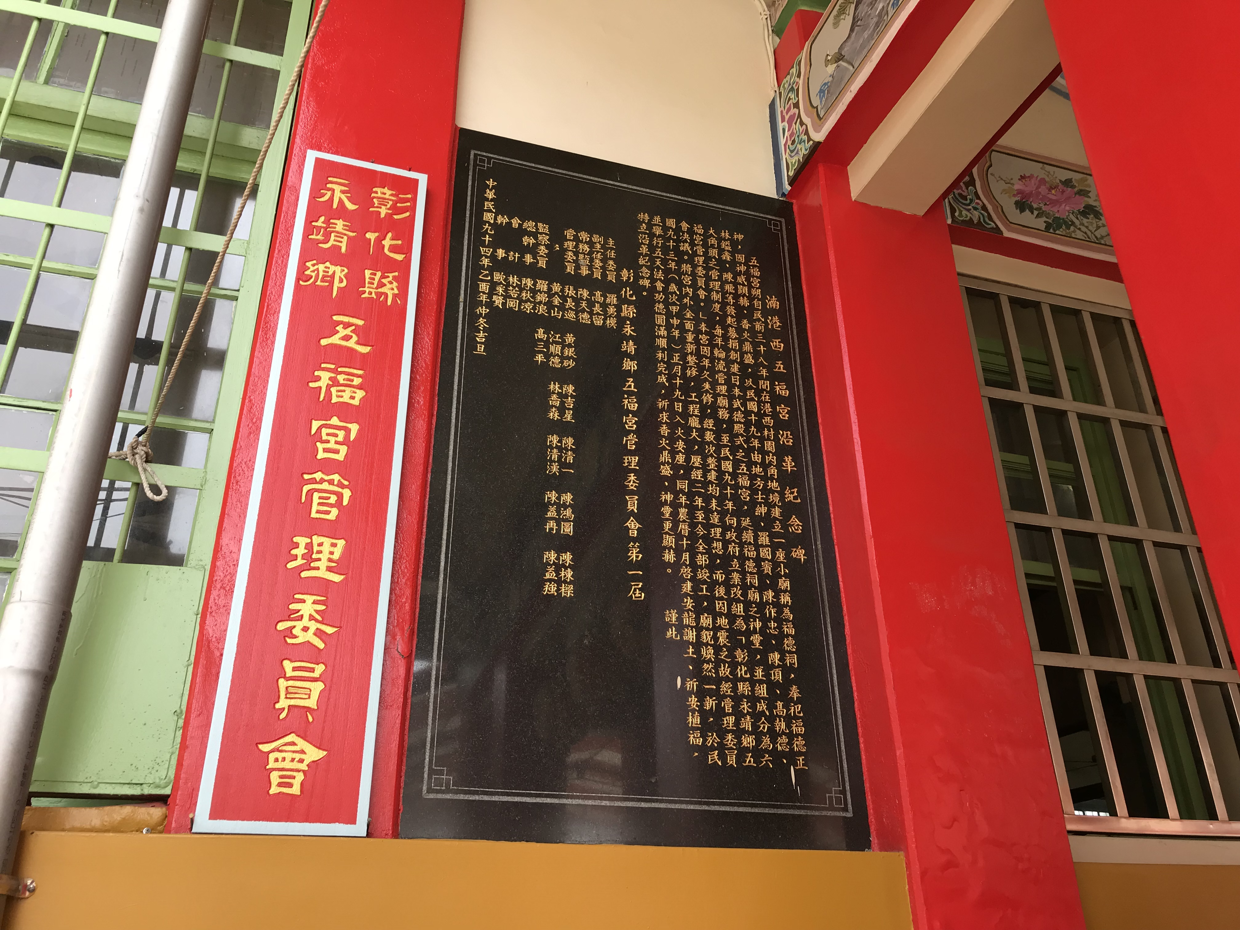 中文（台灣）: 永靖五福宮沿革